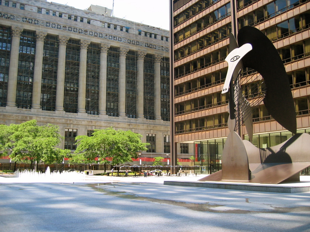 Daley Plaza, Chicago, Illinois.